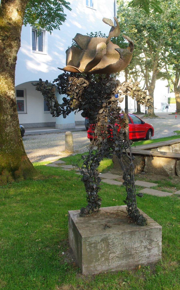 Skulptur von Angerer d. J. in 83435 Bad Reichenhall (Salinenstraße/Domprobst-v.-Lechner-Platz/Kirchgasse) zum Gedenken an die Opfer des Bombenangriffs auf Bad Reichenhall am 25. April 1045